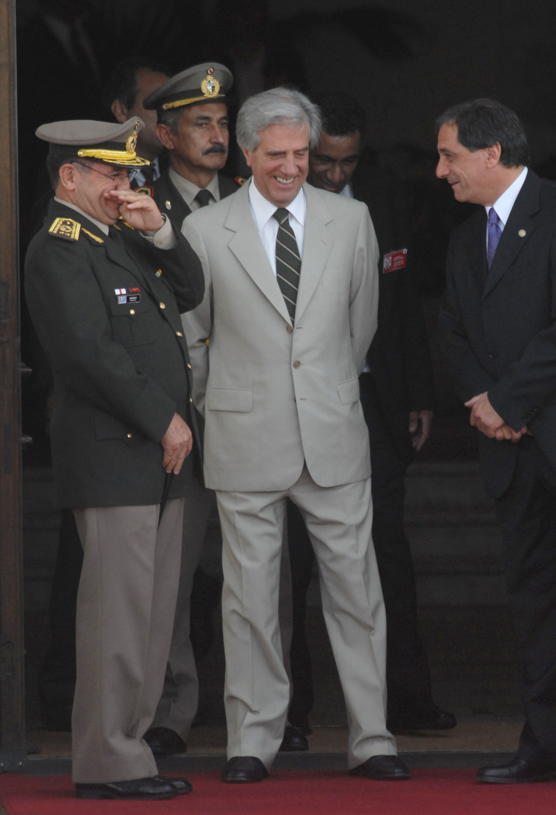 Tabaré Vázquez y militares.